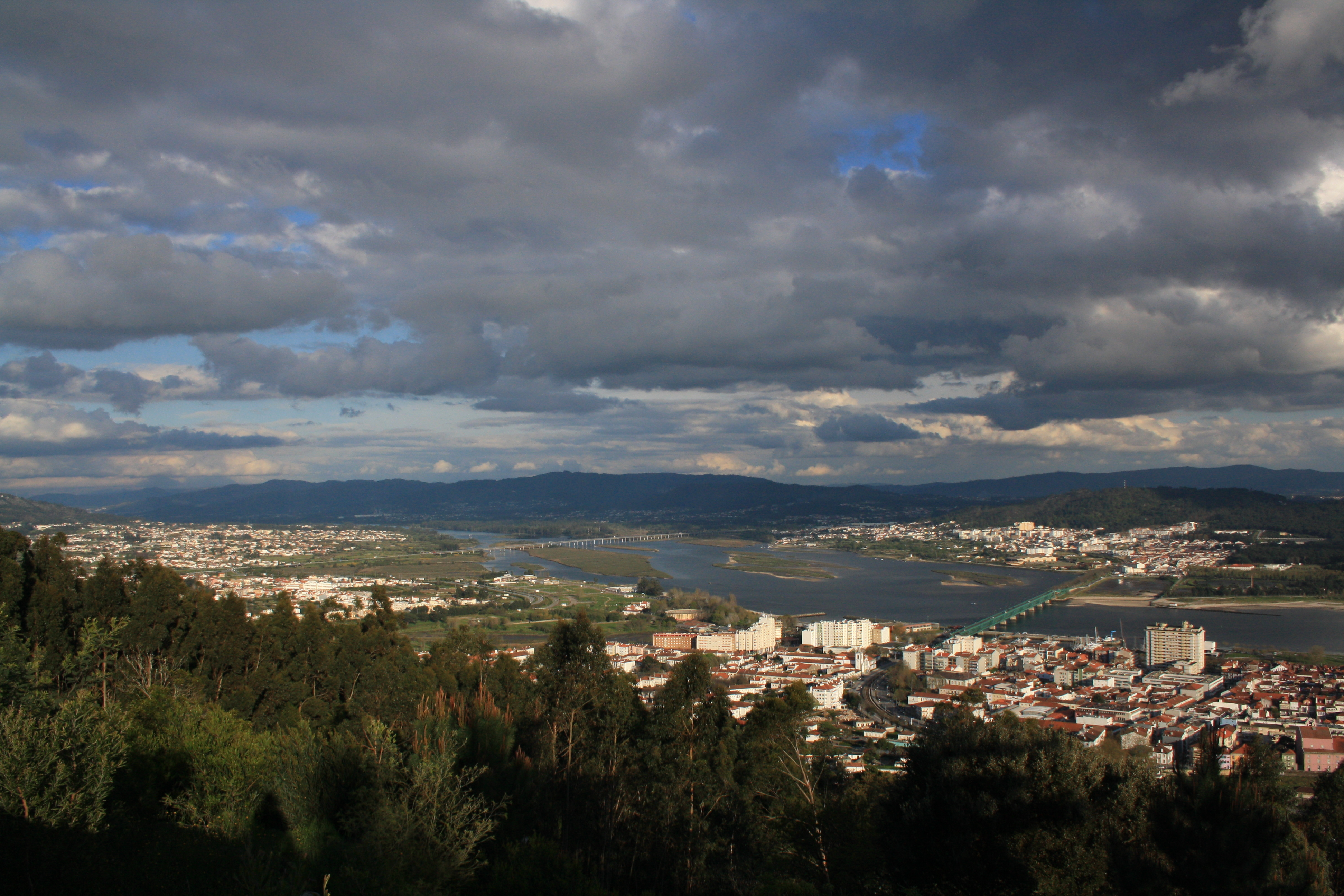 Parte este del Viana do Castelo